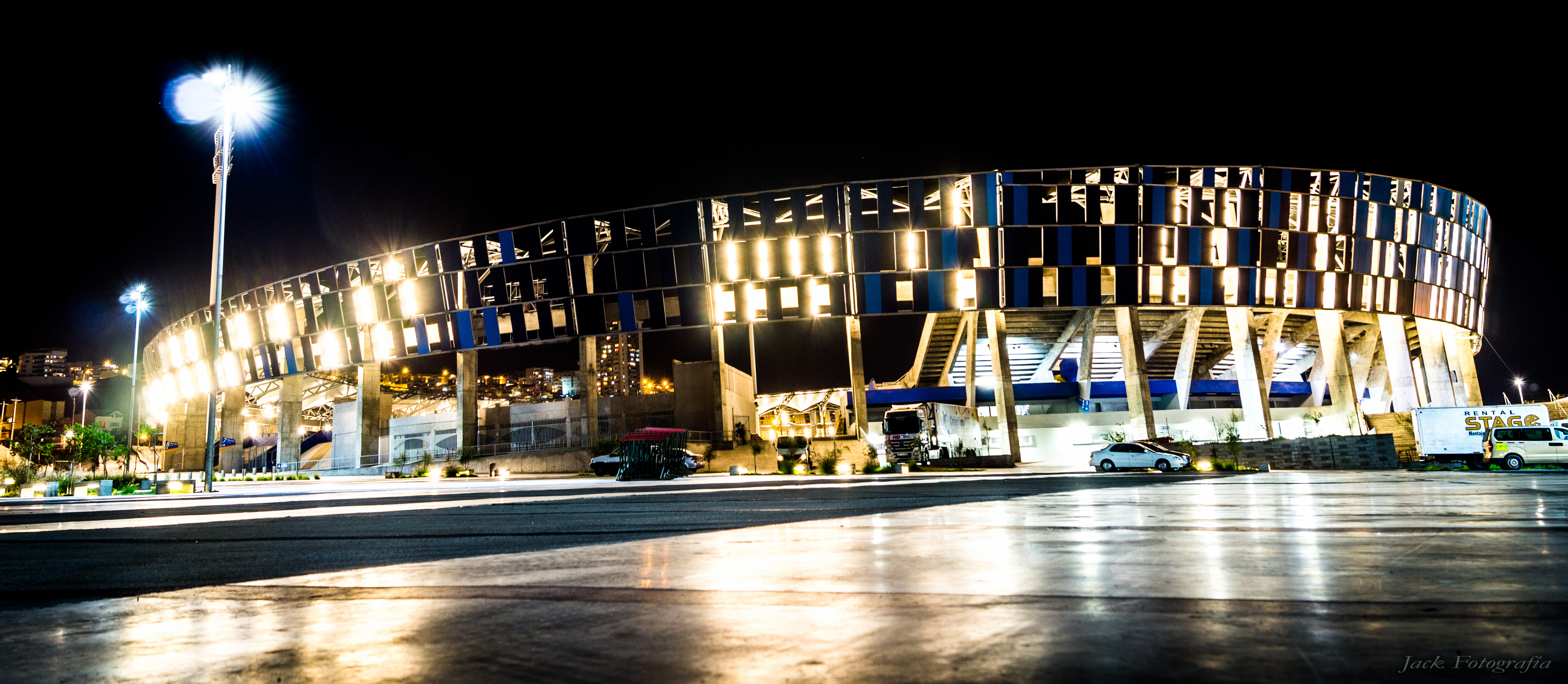 Panorámica nocturna del Estadio Regional Calvo y Bascuñán de Antofagasta, Chile.